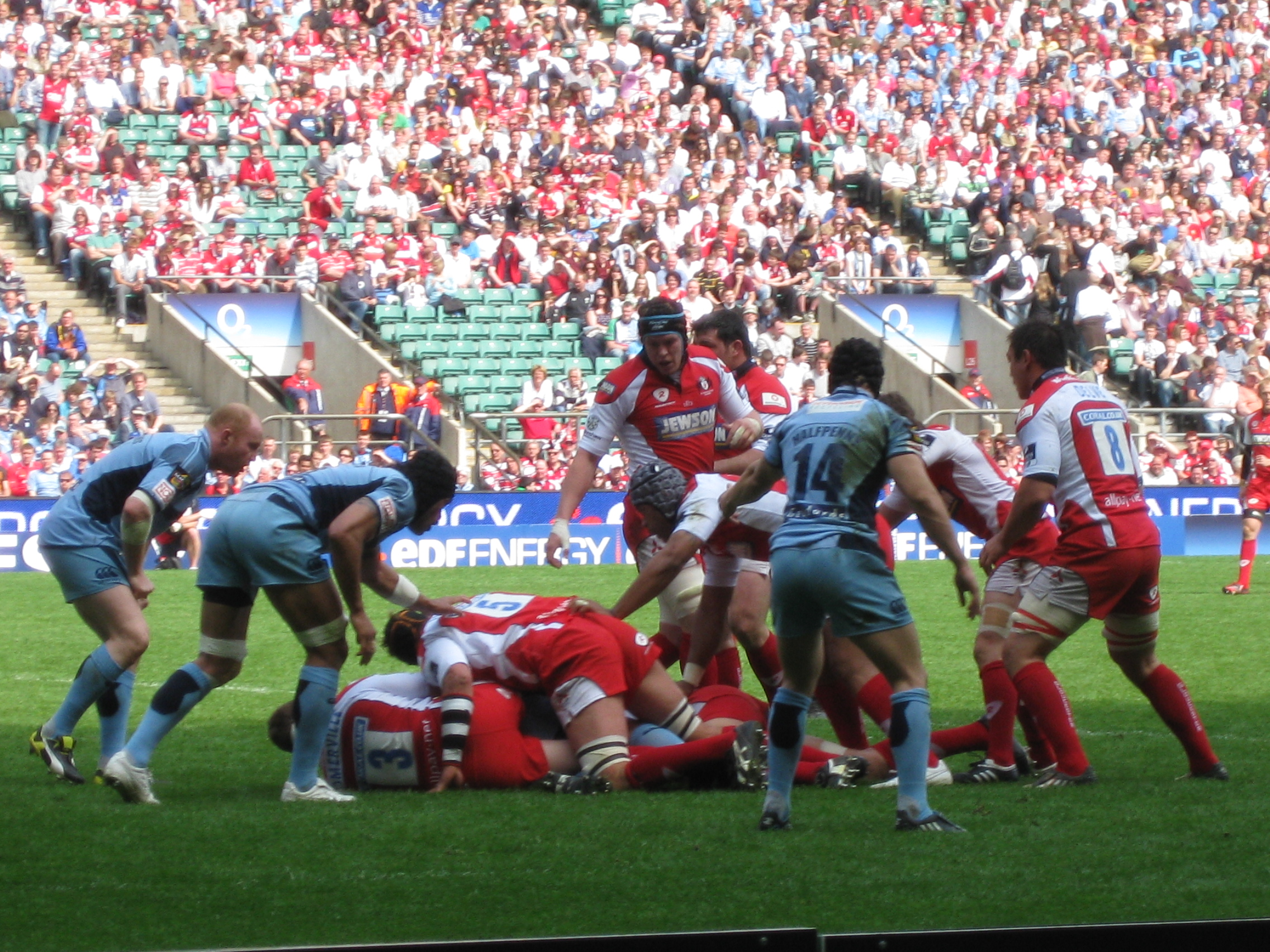 Gloucester et les Cardiff Blues en Coupe anglo-galloise en finale en avril 2009 au stade de Twickenham. Prise le 18 avril 2009. Gloucester Rugby and Cardiff Blues in final cup in Twickenham stadium. 18 April 2009.